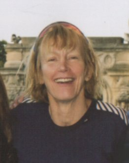 Rosie Swale Pope